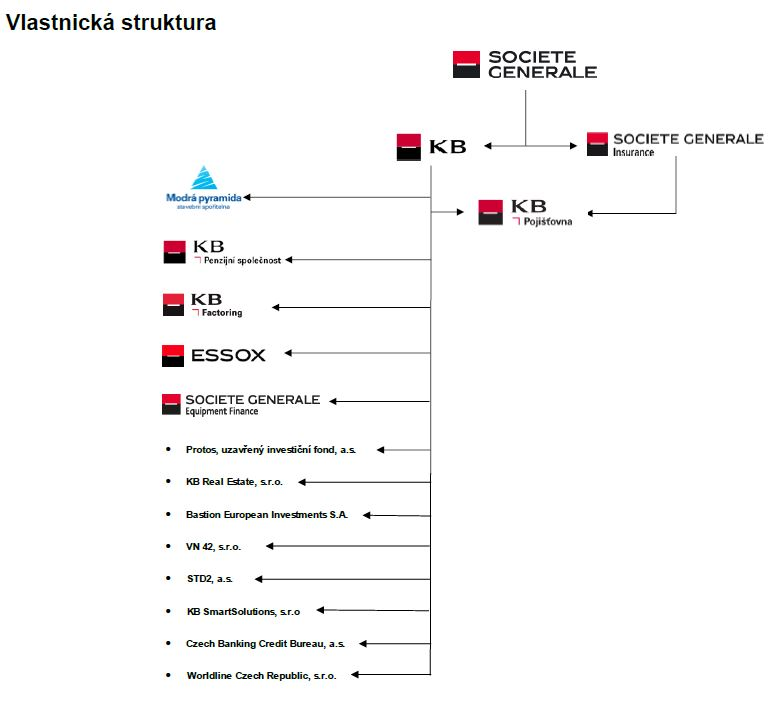 Graf vlastnické struktury společnosti Komerční pojišťovna